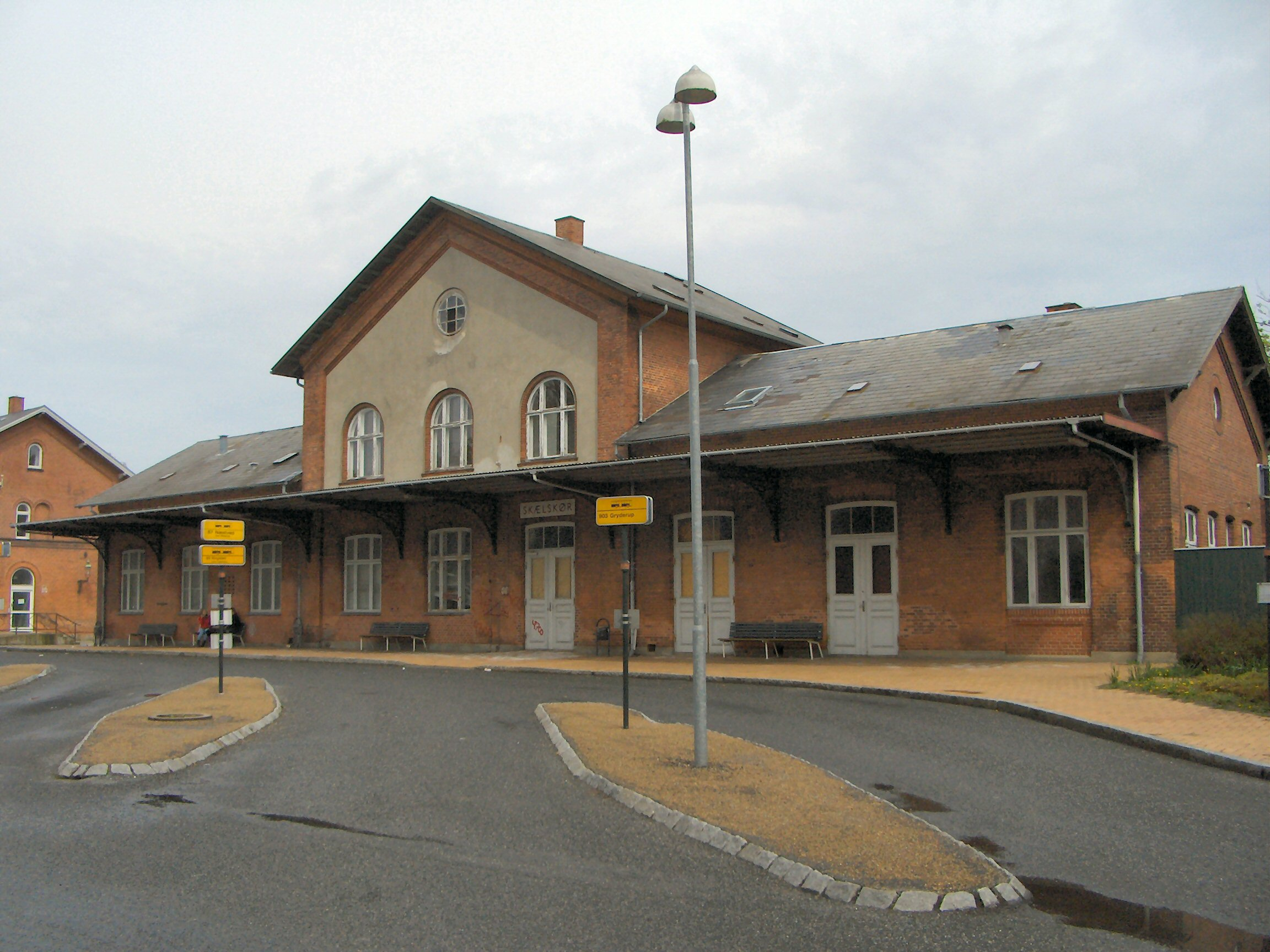 Skælskør_Station